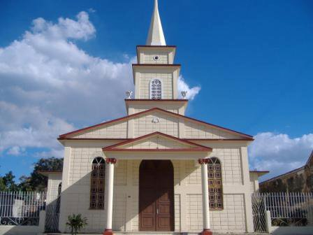 Iglesia Bautista de Colón, ciudad cubana en provincia de Matanzas.